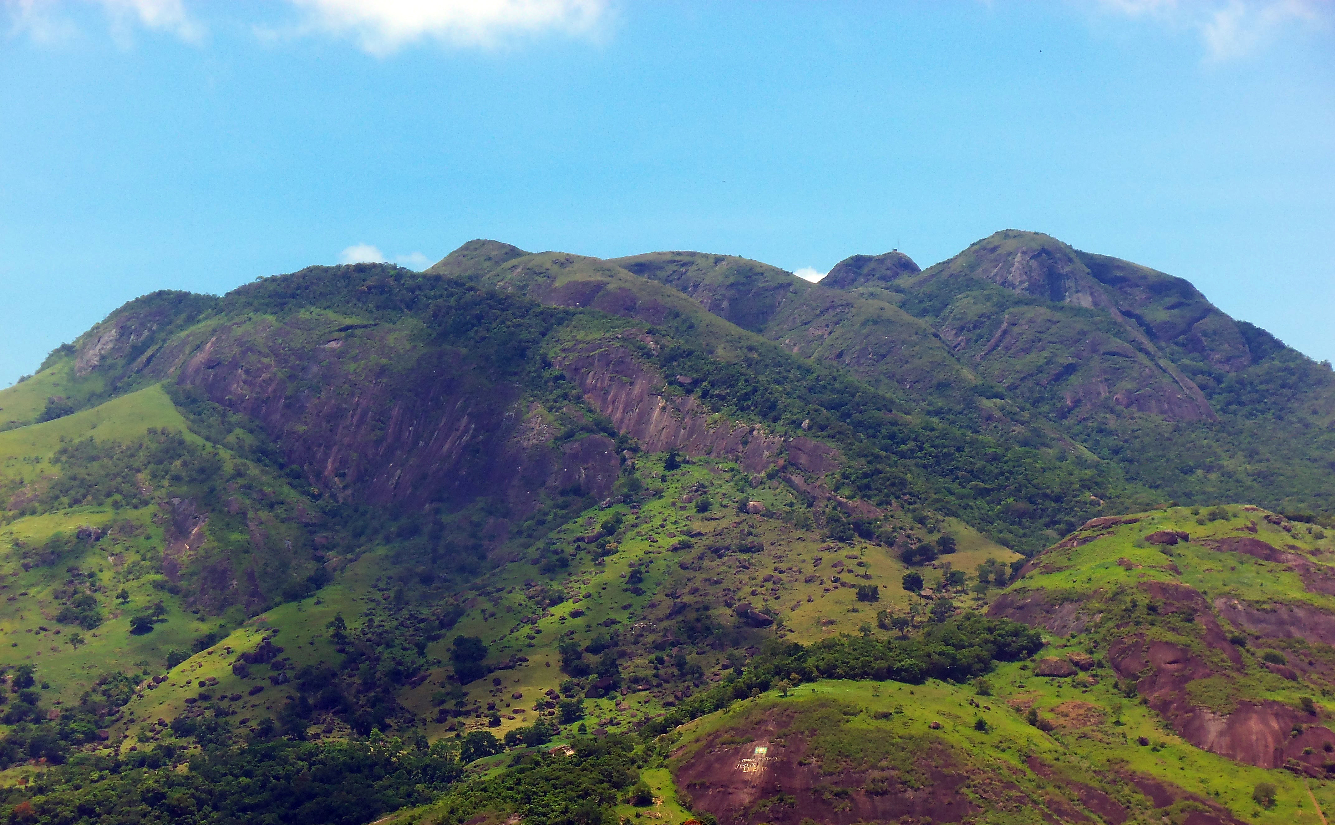 Mestre Álvaro, visto da BR-101 entre os bairros Planalto Serrano e Vista da Serra II.